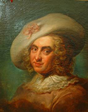 Nicolas Chédeville par Alexis Grimou. Photographie d'un tableau personnel m'appartenant.